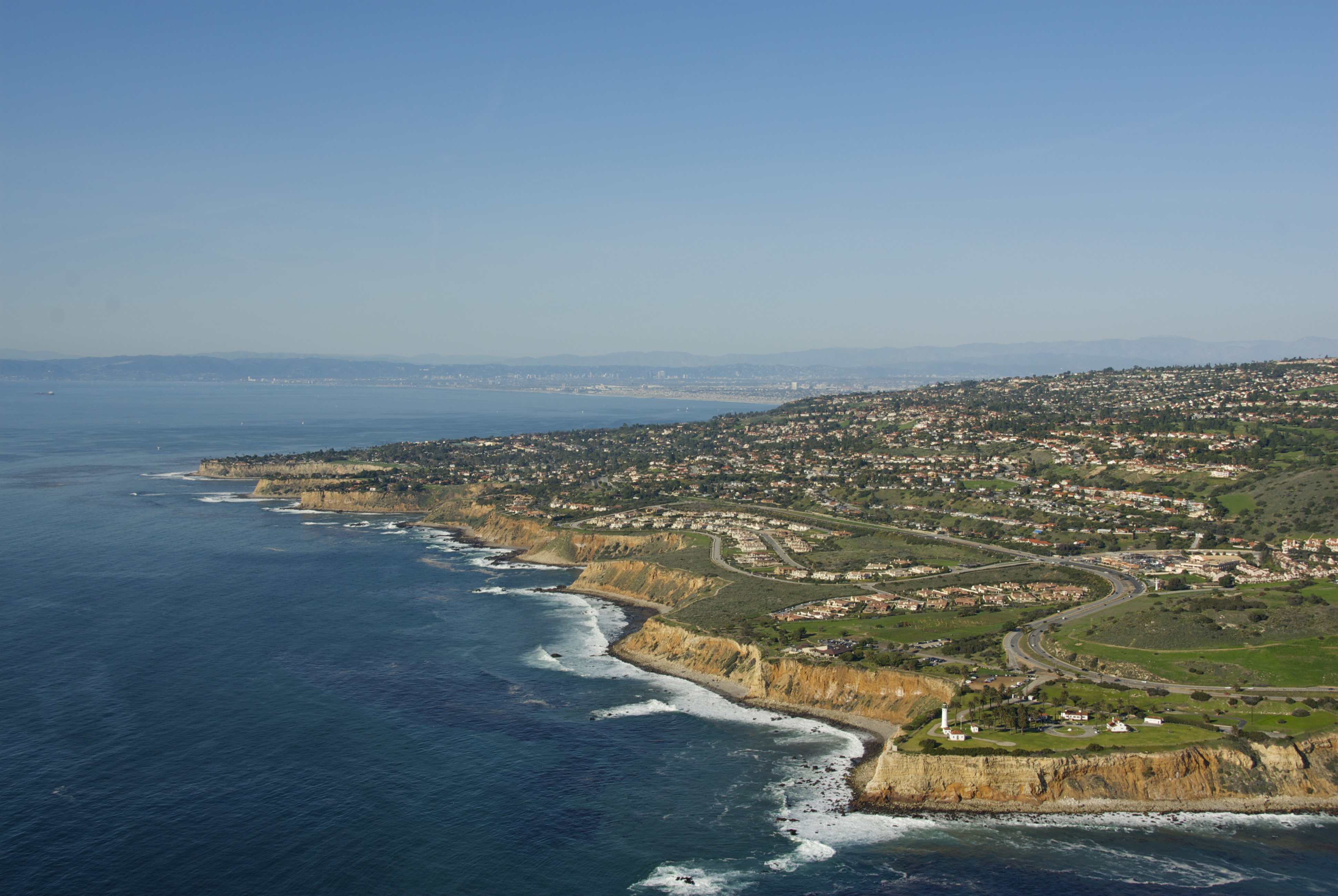 Palos Verdes